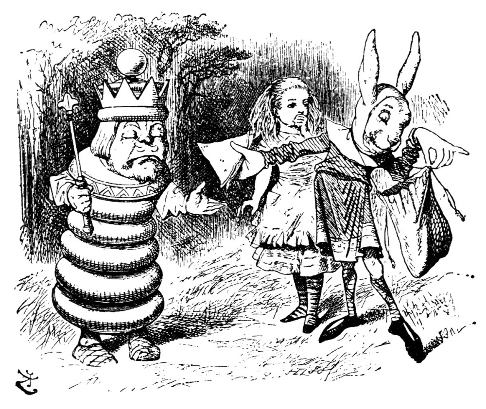 гравюра Джона Тенниела